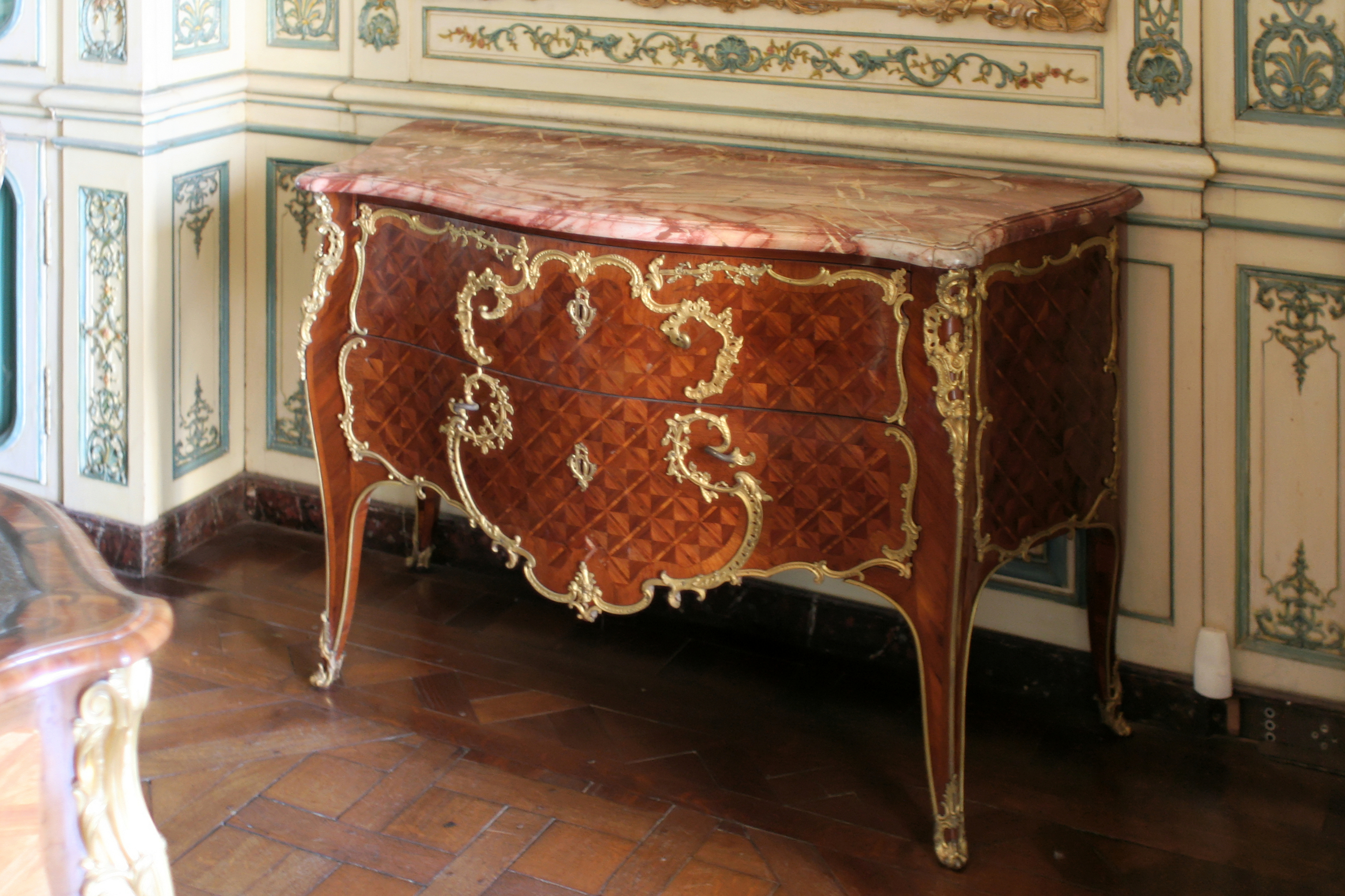 Château de Versailles, appartement du Dauphin, bibliothèque du Dauphin. Commode estampillée Mathieu Criaerd, livrée par le marchand-mercier Hebert le 29 janvier 1748 pour le cabinet de retraite du Dauphin. Marqueterie de bois.Numéro d'inventaire : V4948